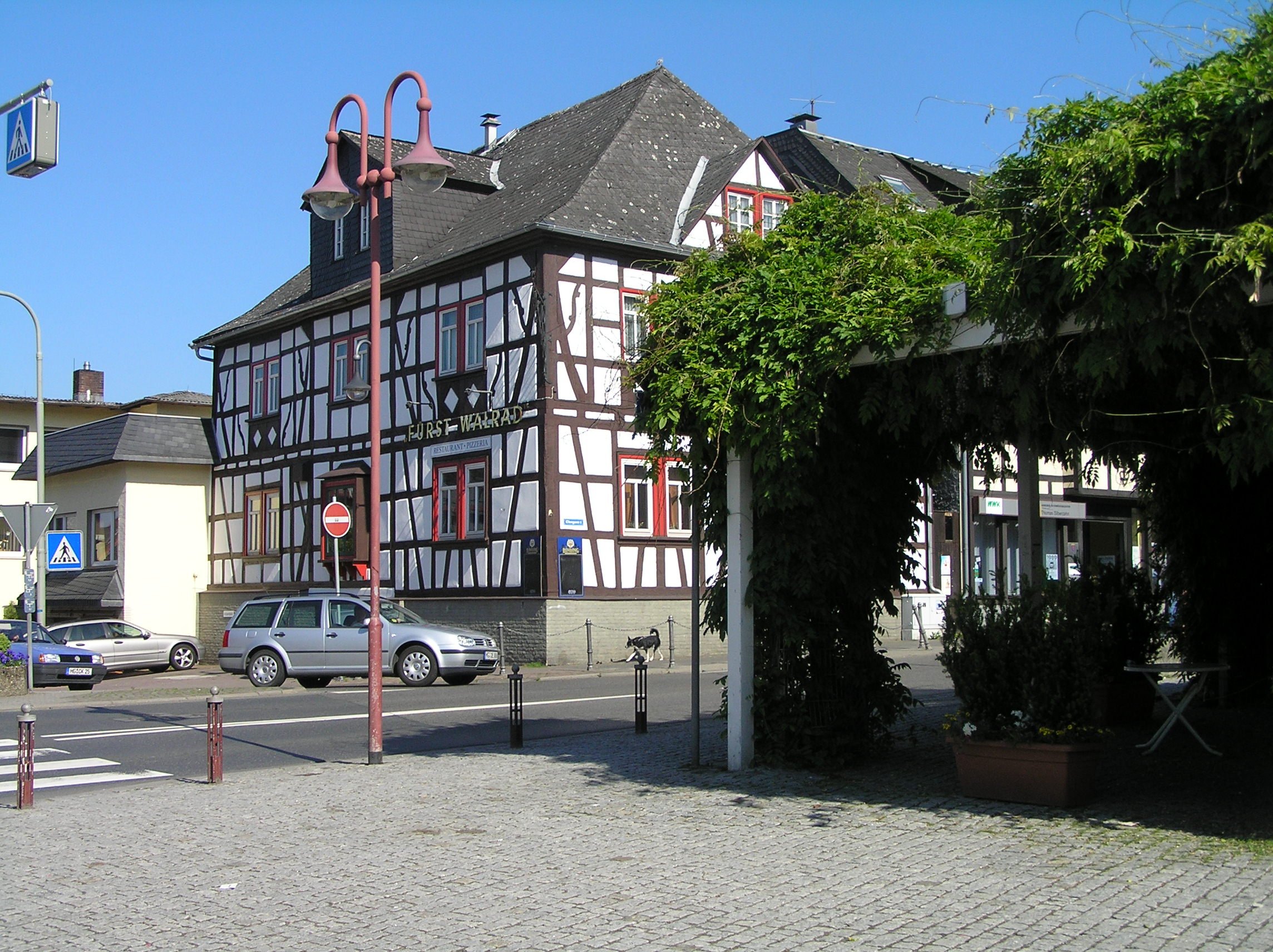 Restaurant "Fürst Walrad" in Usingen am Schlossplatz